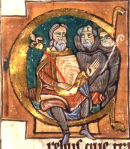 Guillaume le Pieŭx. BN Ms. Lat. 17716, f°85.